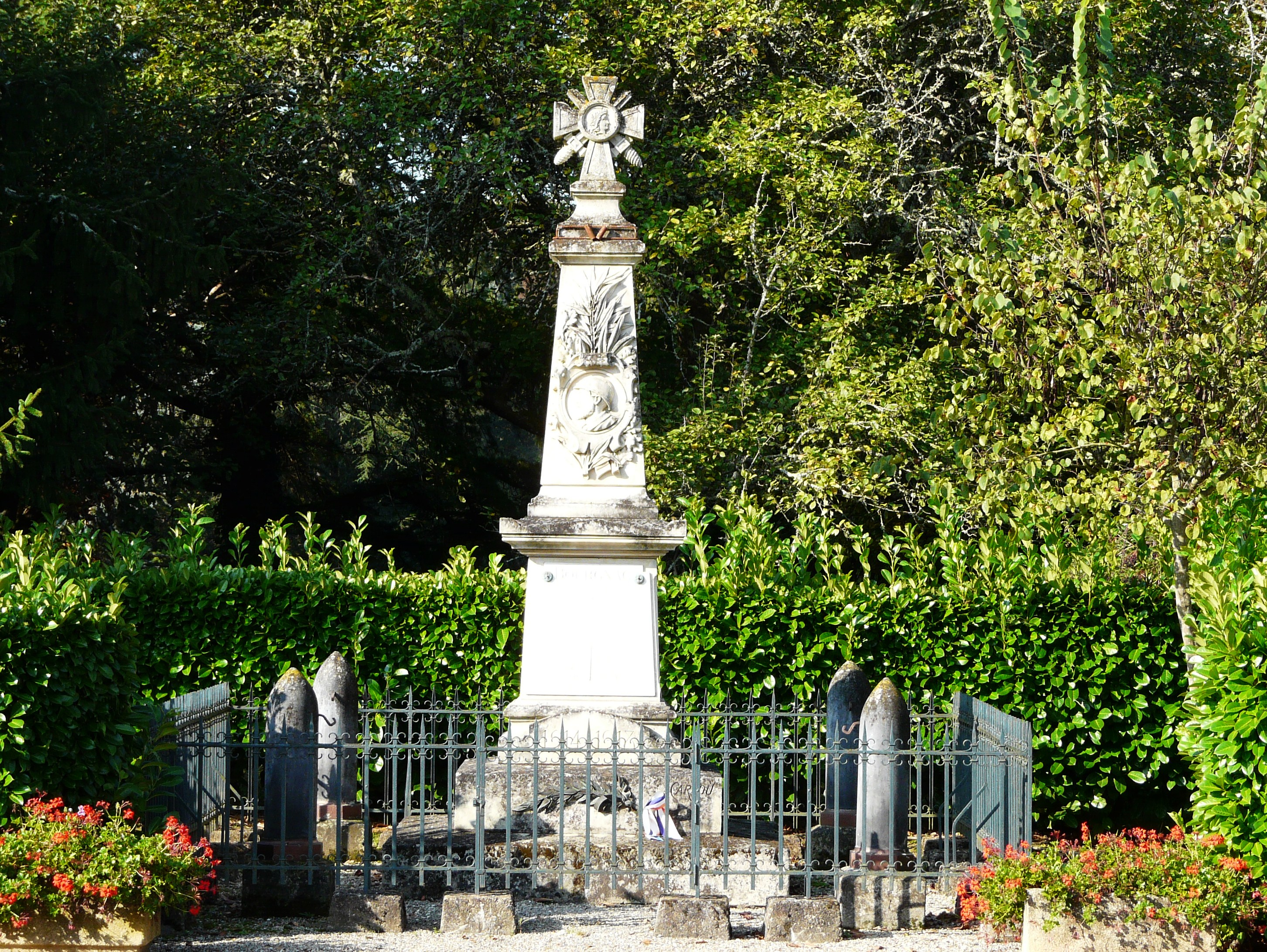 Le monument aux morts, Bourgnac, Dordogne, France